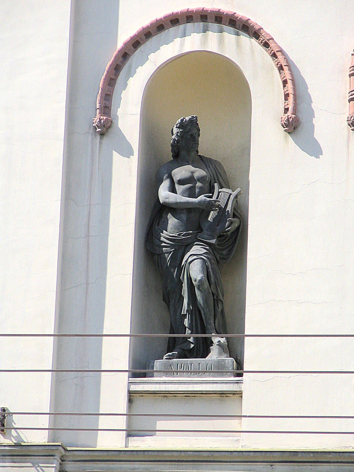 Бог Аполон у ниши на фасади Капетан Мишиног здања (фото: Михаило Грбић, 14.5.2005.)